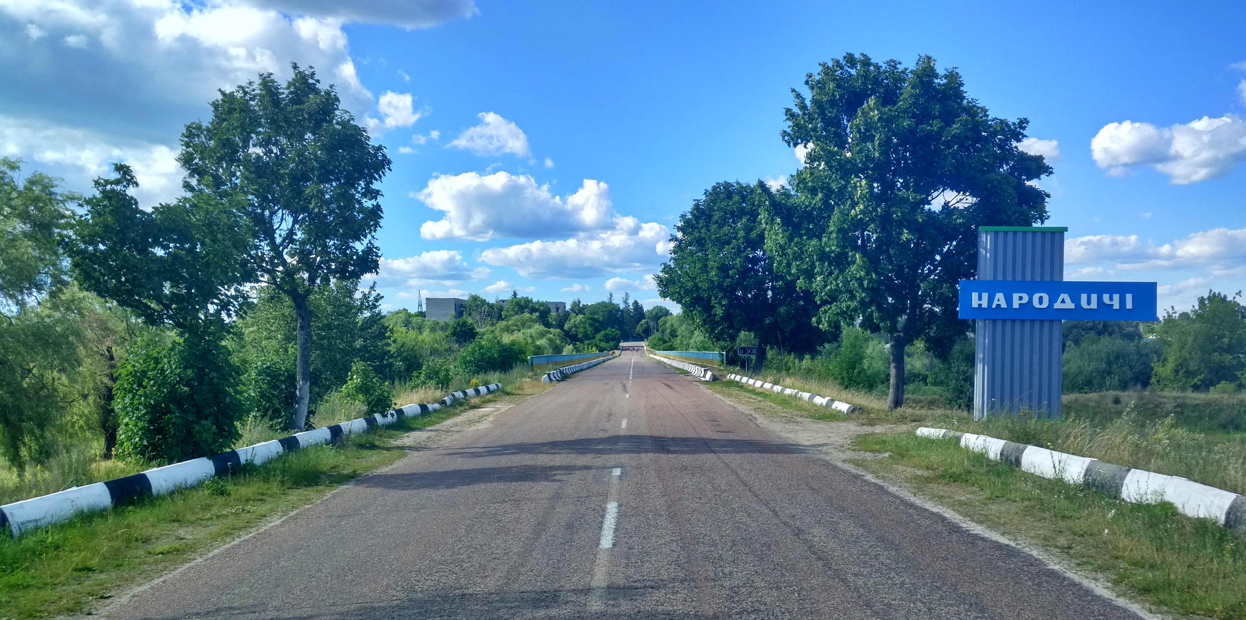 В'їзд в Народичі